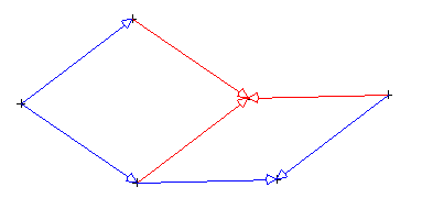 Losanges d'un pavage de Penrose. Image personnelle.